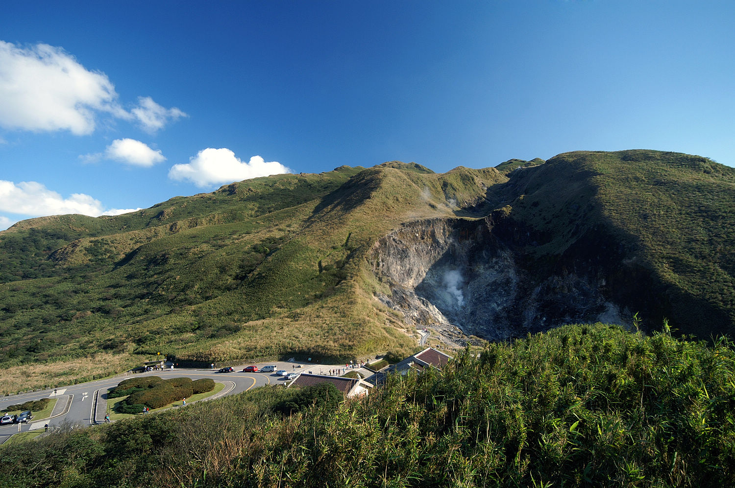 小油坑噴發口與遊客服務站。